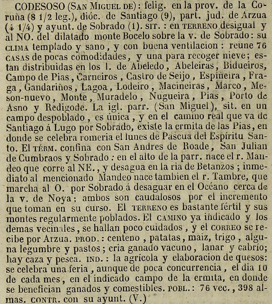 Codesoso no Diccionario geográfico-estadístico-histórico de España y sus posesiones de Ultramar.